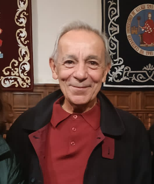 El actor José Luis Gómez en el Paraninfo de la Universidad de Alcalá, durante el acto de entrega de los IV Premios Francisca de Pedraza, en Alcalá de Henares (Comunidad de Madrid - España).